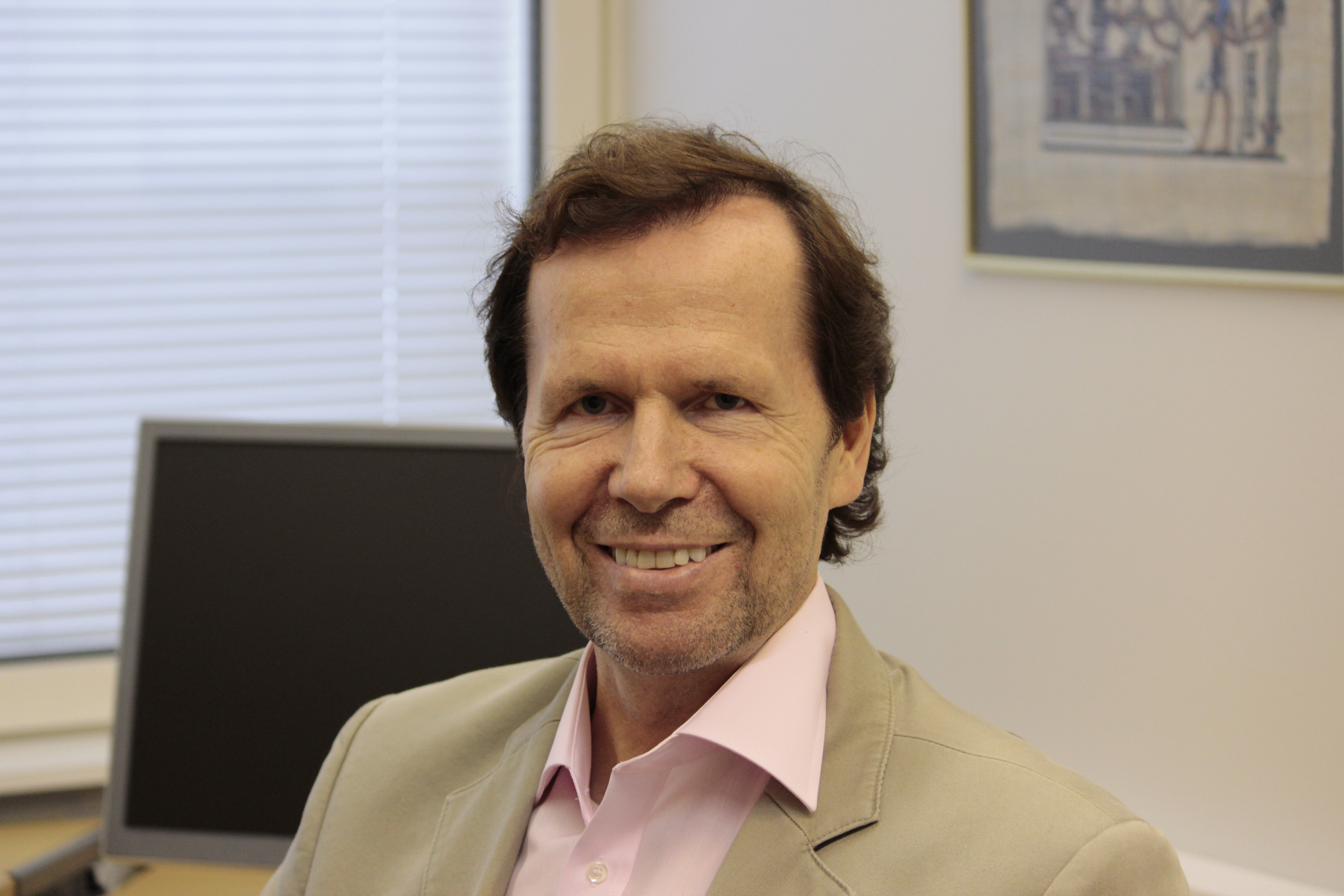 Aaro Harju